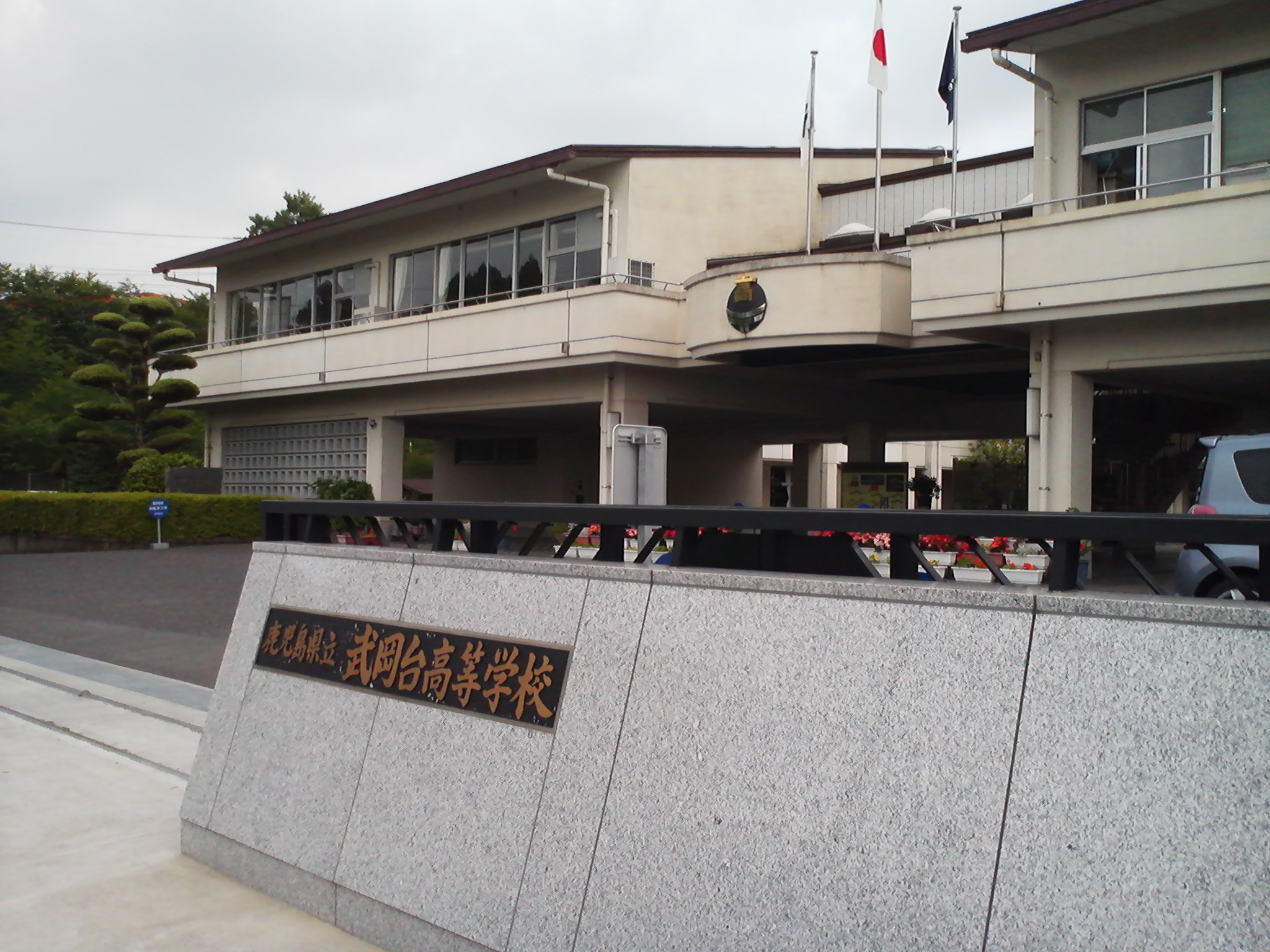 鹿児島県立武岡台高等学校の外観